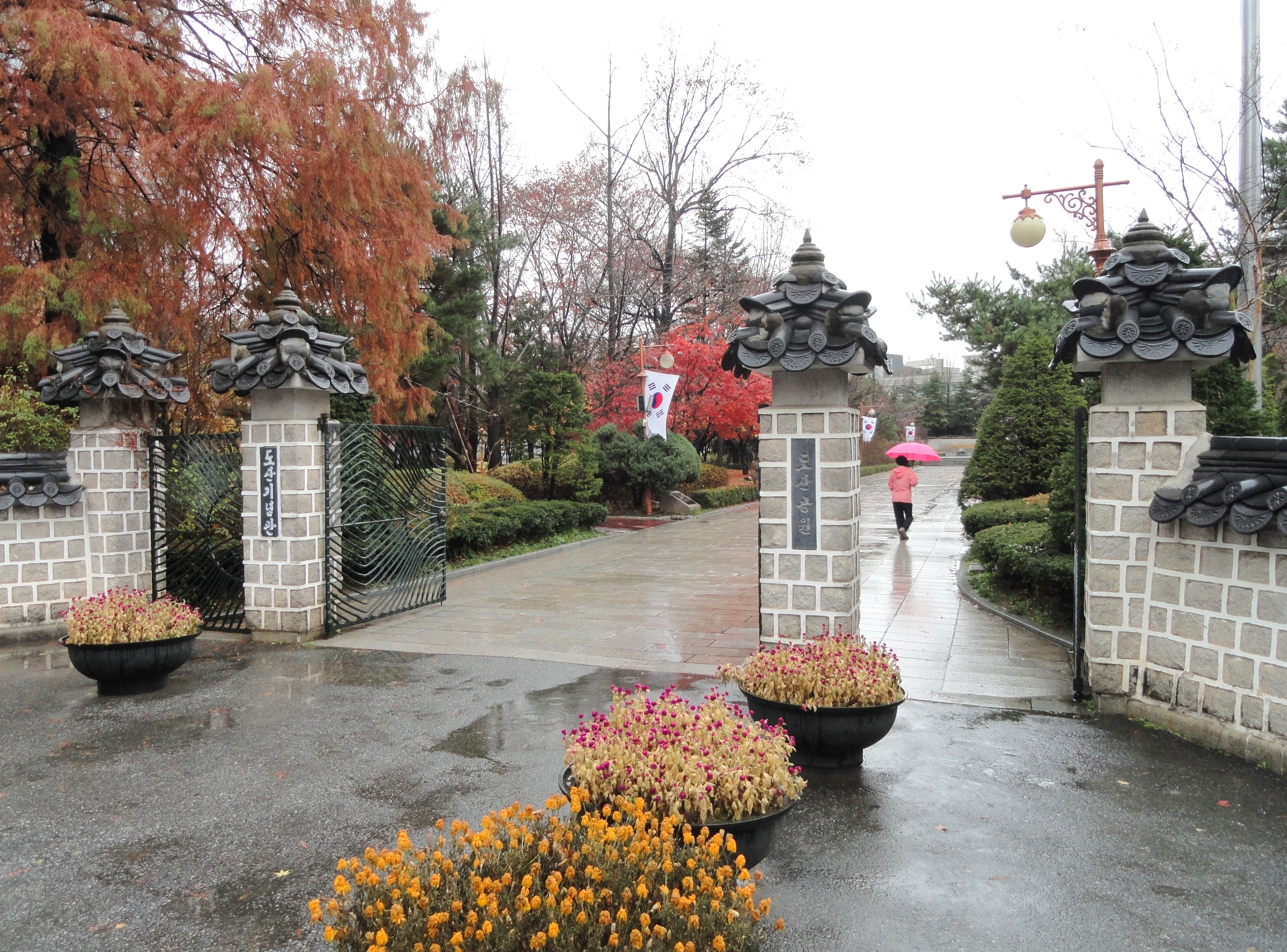 Dosan Memorial Park in Gangnam-gu, Seoul, South Korea.